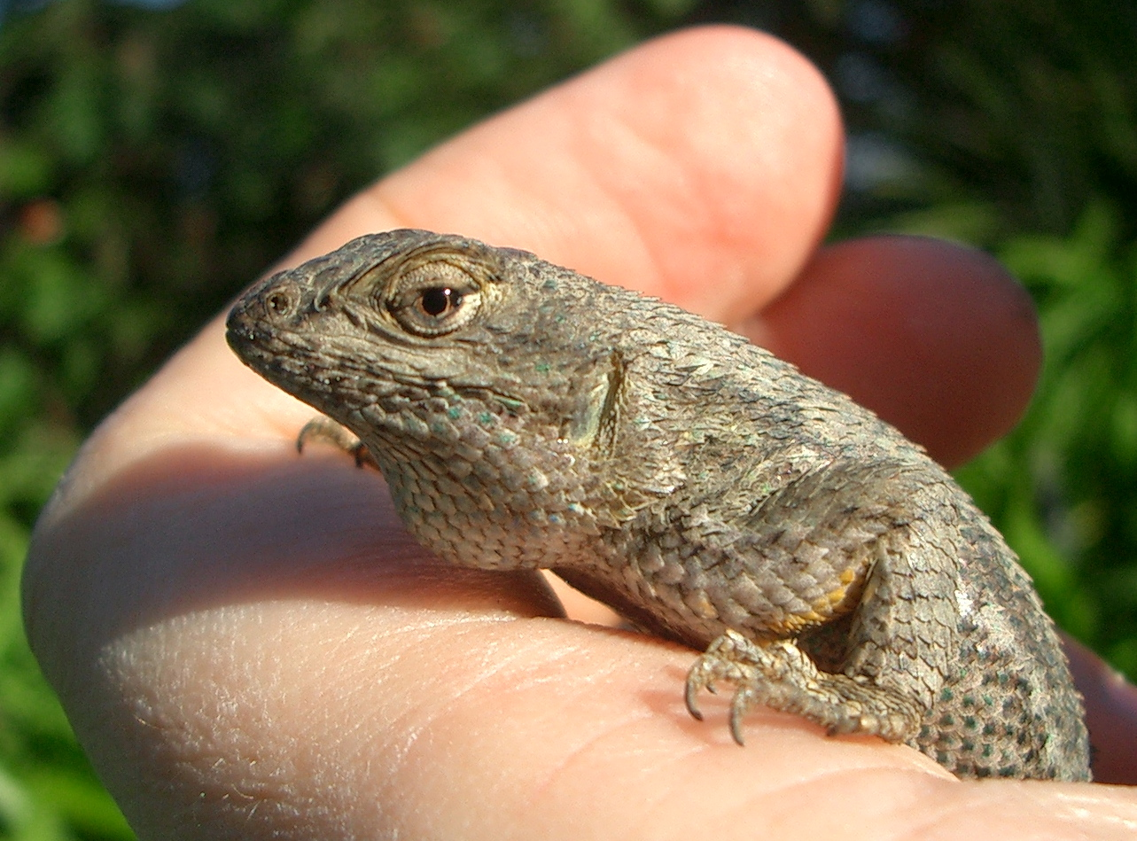 Angst voor kruipdieren?.